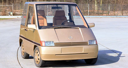 Bildbeschreibung: Mercedes-Benz Konzeptfahrzeug "Daimler-Benz Studie/study" von 1981/1982 mit der internen Projektbezeichnung "NAFA" (Nahverkehrsfahrzeug) Quelle: Mediaseite der DaimlerChryslerAG Genehmigung: Gern können Sie für Ihre Tätigkeit für die Wikipedia Inhalte der DaimlerChrysler Medienseiten verwenden. Dazu erkennen wir die Bedingungen nach GNU-FDL an. Das Angebot bezieht sich auch auf die vorhandenen Bilder. (Dr. Josef Ernst, Communications, DaimlerChrysler AG)